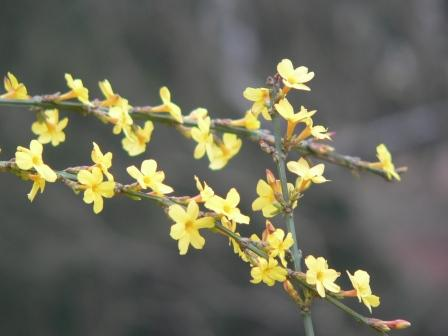 迎春花 用心阁于2005年3月29日拍摄于宋庆龄故居